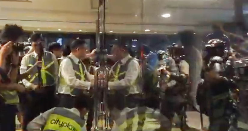 太古城中心爆發警民衝突，再有市民在商場內聚集，要求商場方面回應事件。